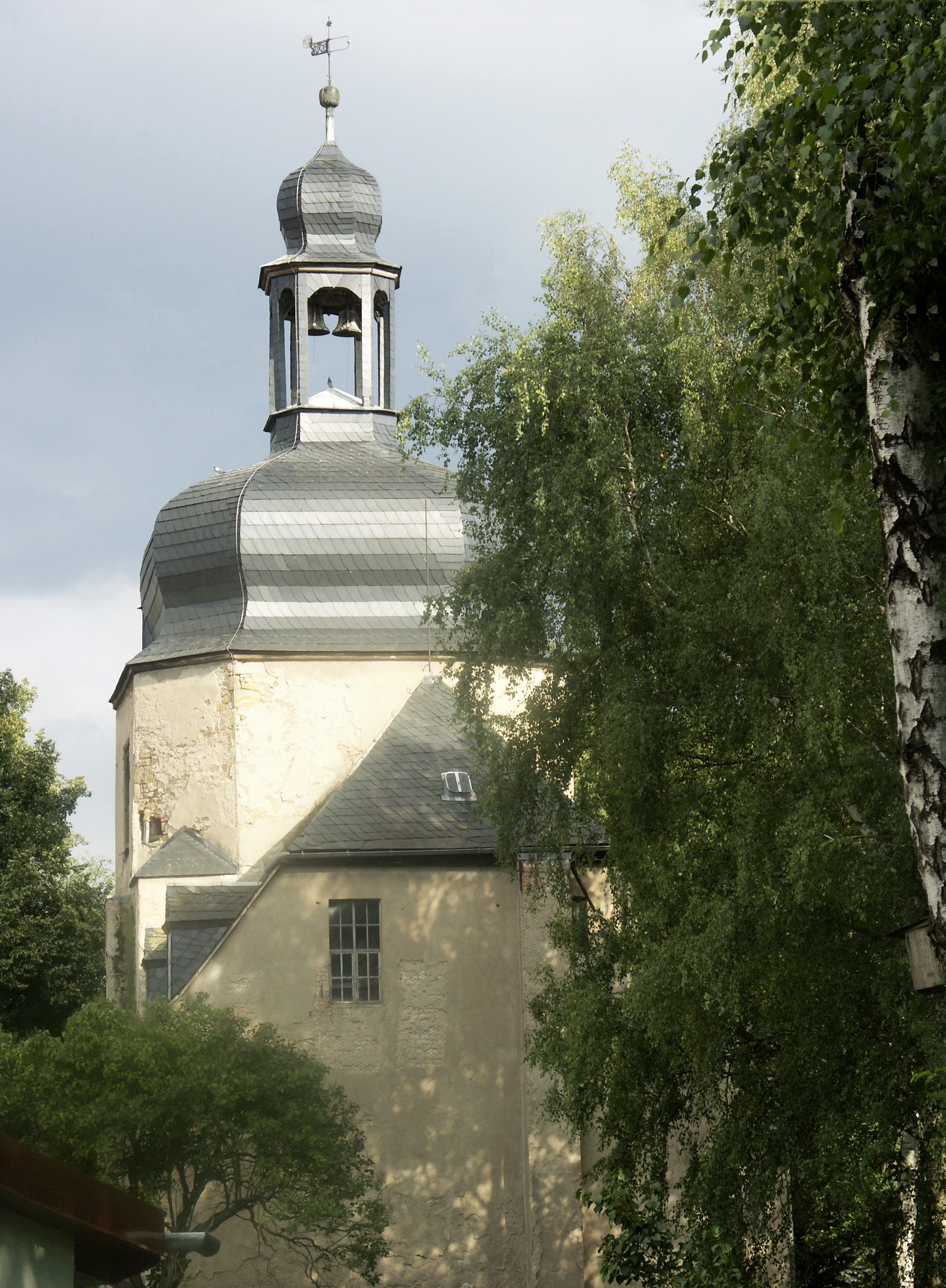 Bonifaziuskirche in Oberheldrungen, Thüringen, Deutschland